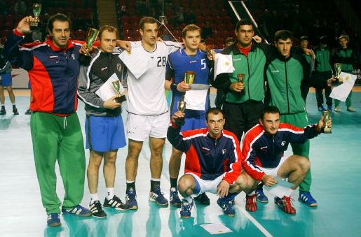 игроки команды «Дрим-Тим» по итогам Челендж Трофи в Тбилиси